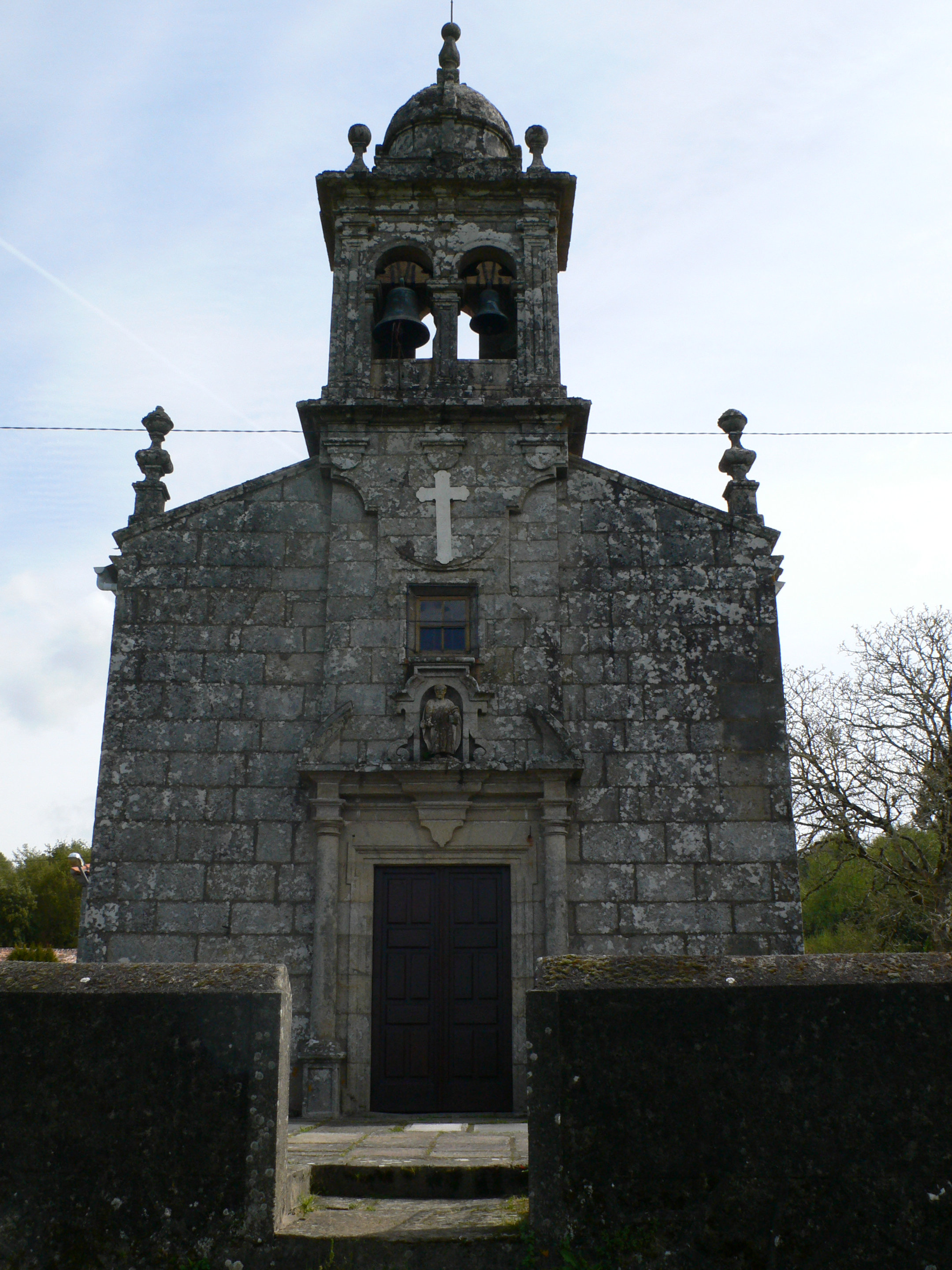 Igrexa de San Pedro de Salgueiros, Vila de Cruces